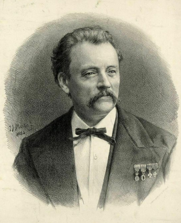 Portret van Richard Hol (1825-1904)